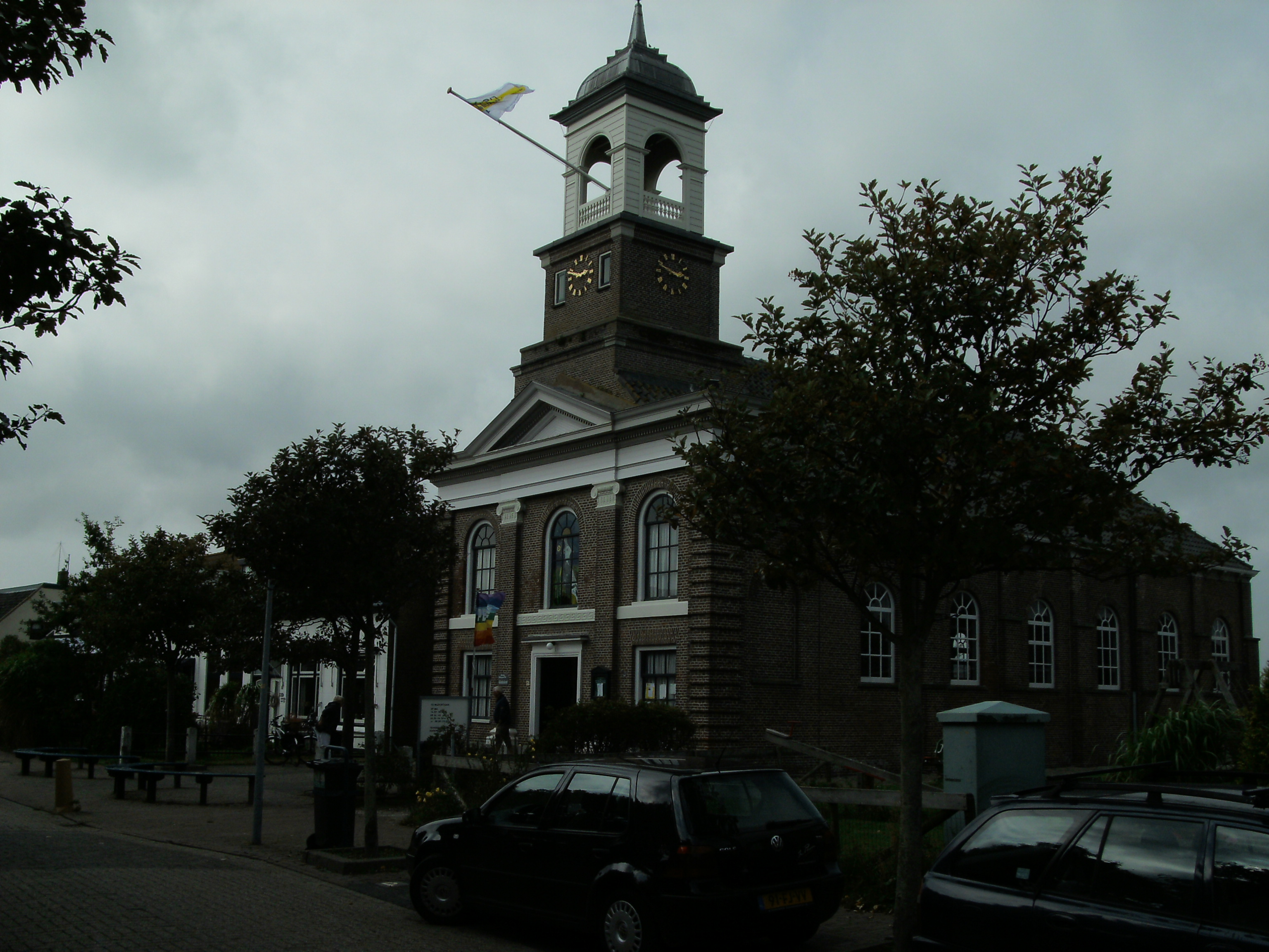 Voorgevel Waddenkerk - De Cocksdorp